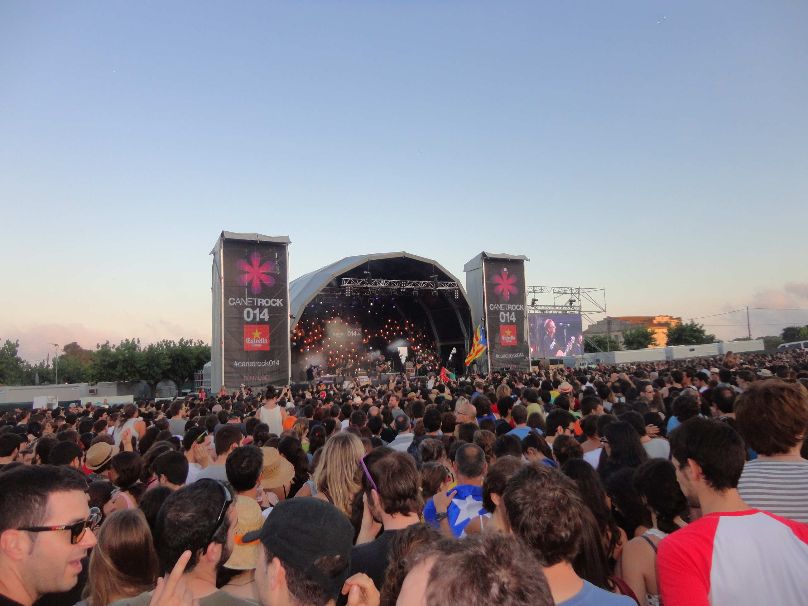 Escenari del Canet Rock 2014